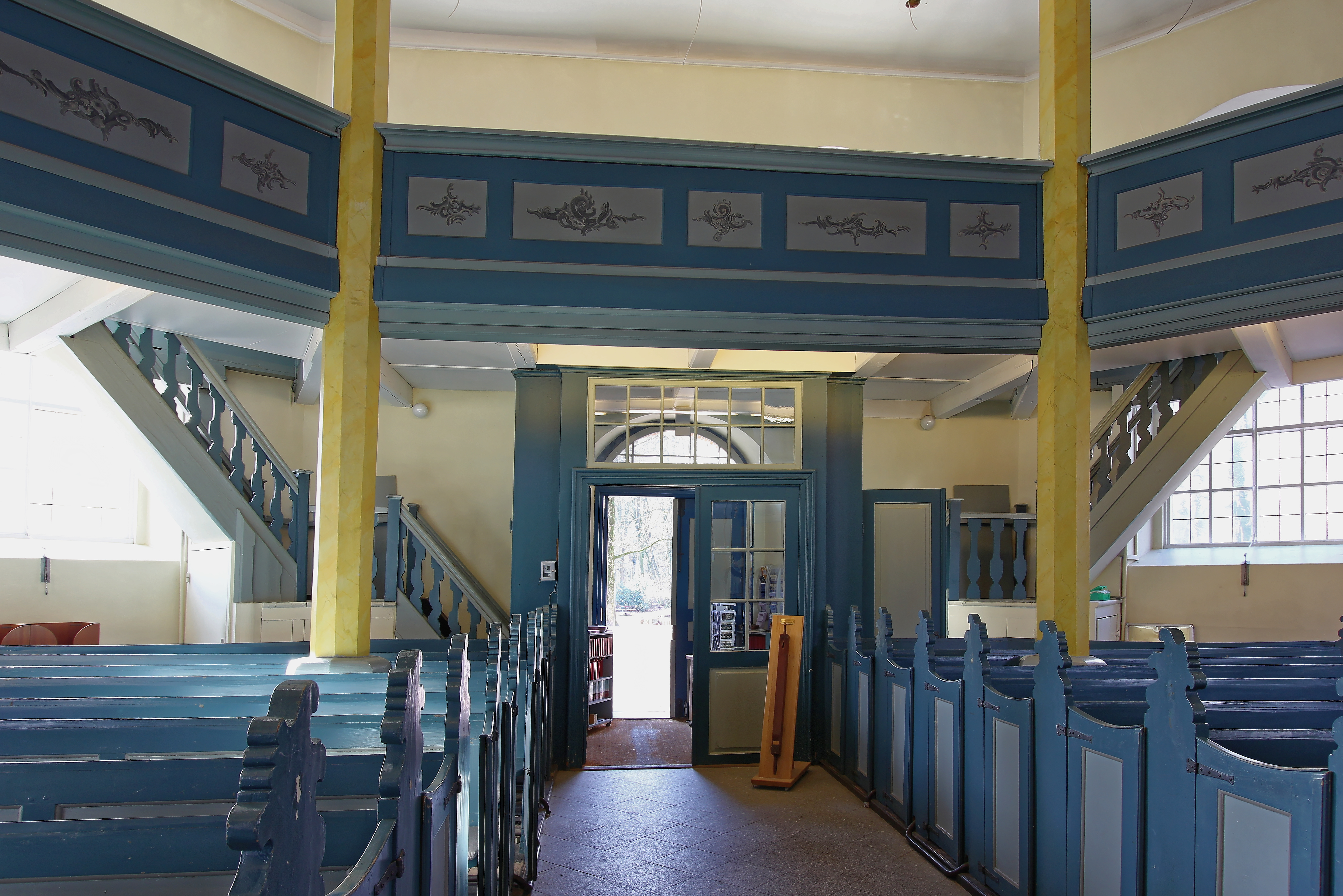 Hamburg-Niendorf, Niendorfer Marktkirche, Haupteingang von innen